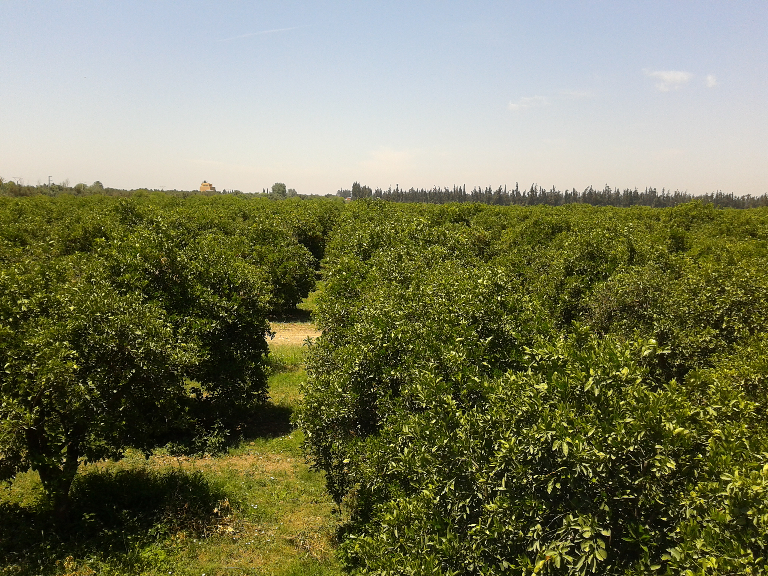 ضيعة فلاحية بتارودانت جنوب المغرب